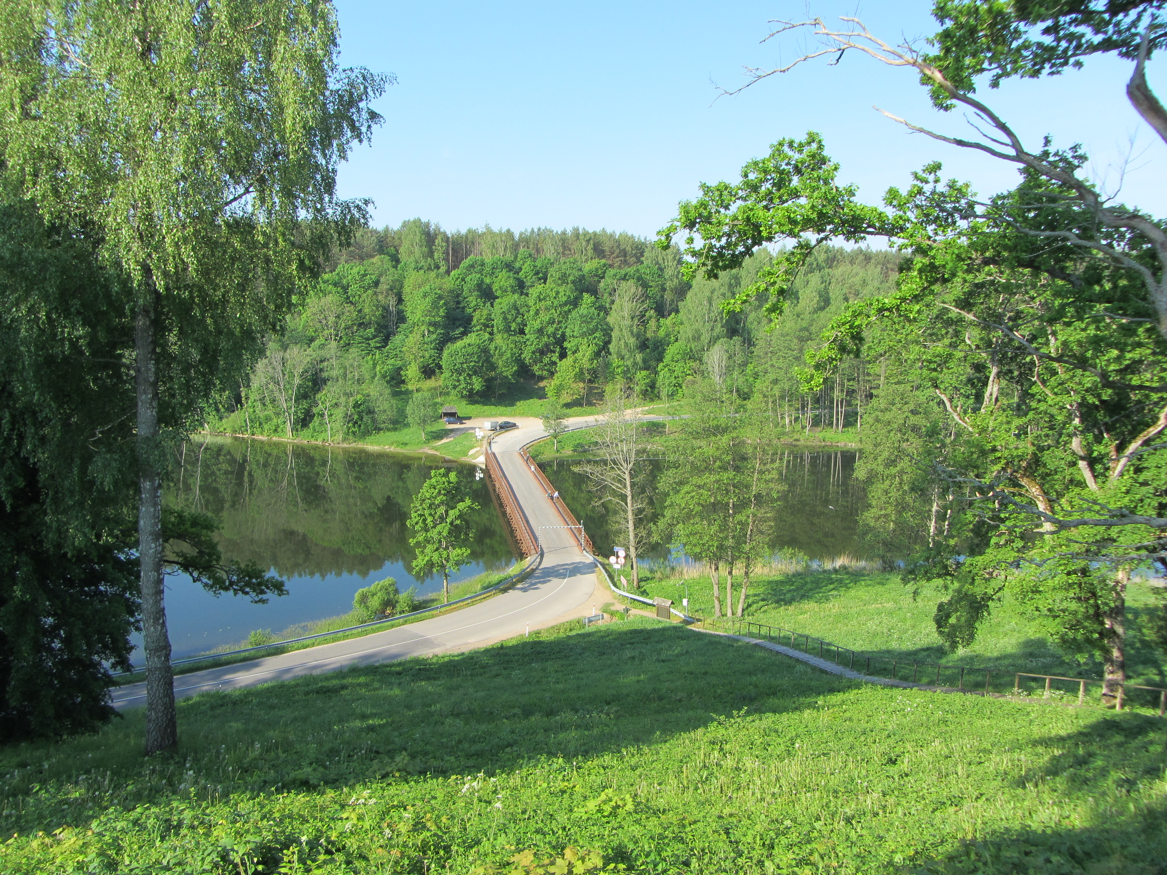 Dubingių sen., Lithuania